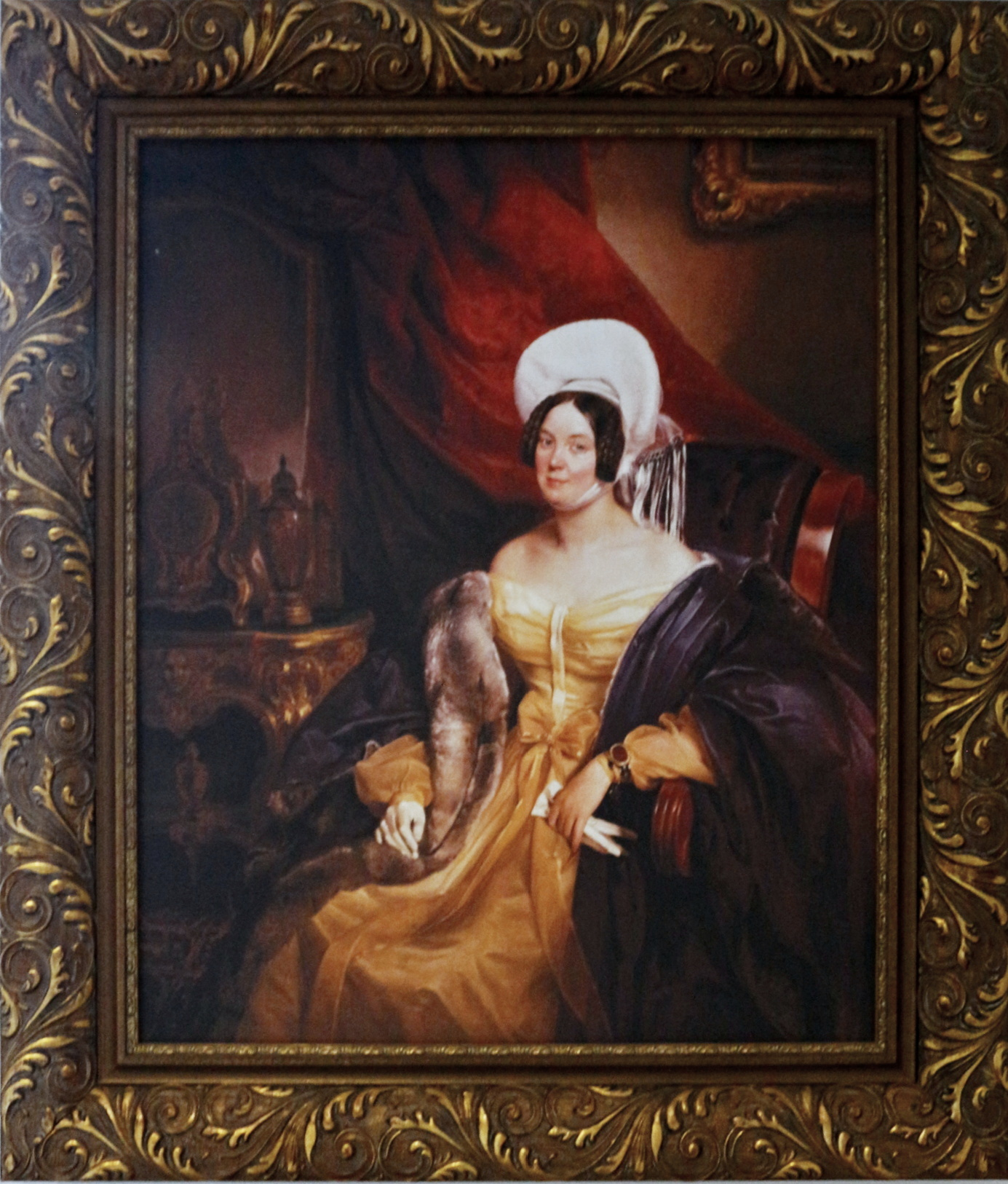 Juliana Hartigová roz. Grundemann-Falkenberská (1788-1866).